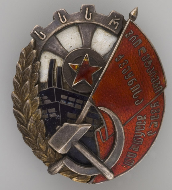 Орден Трудового Красного Знамени Грузинской ССР. Учрежден постановлением ЦИК Грузинской ССР в 1931 году. 2 тип ордена